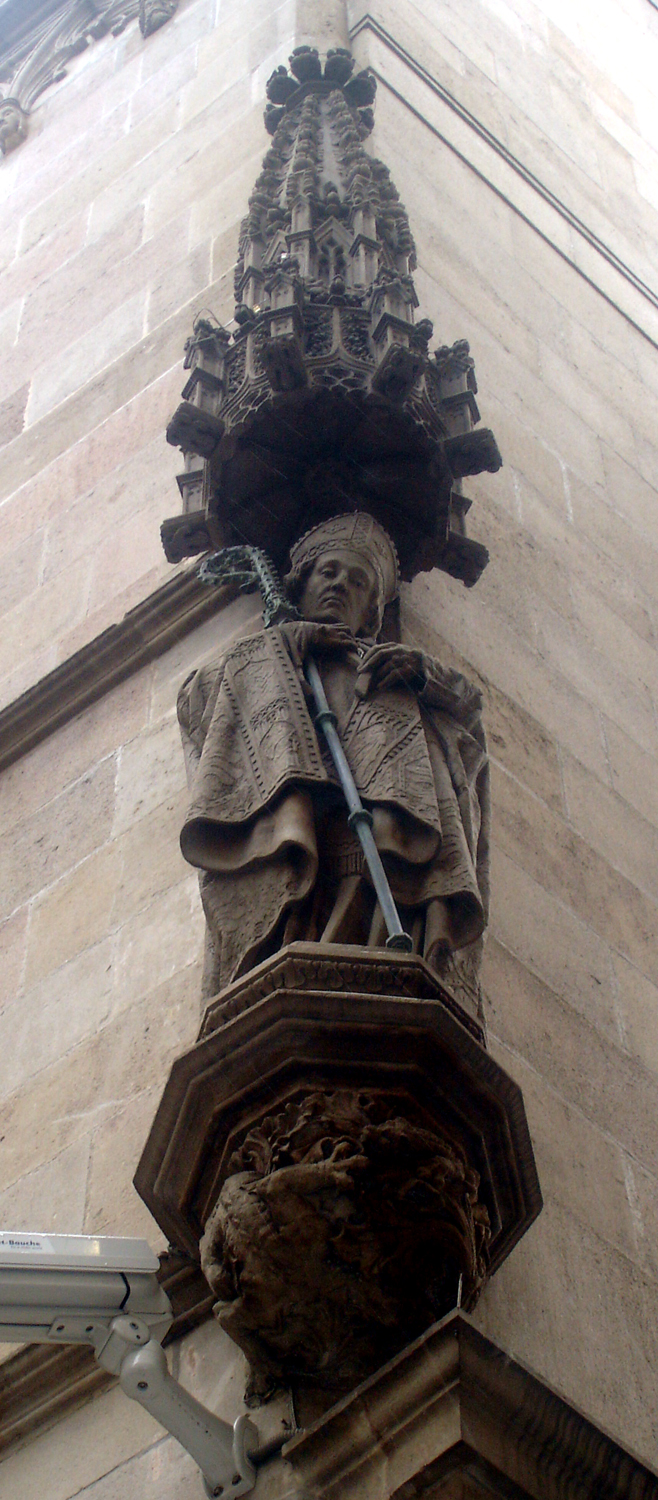 Façana antiga de l'ajuntament de Barcelona (Catalunya, Espanya) - Sant Sever